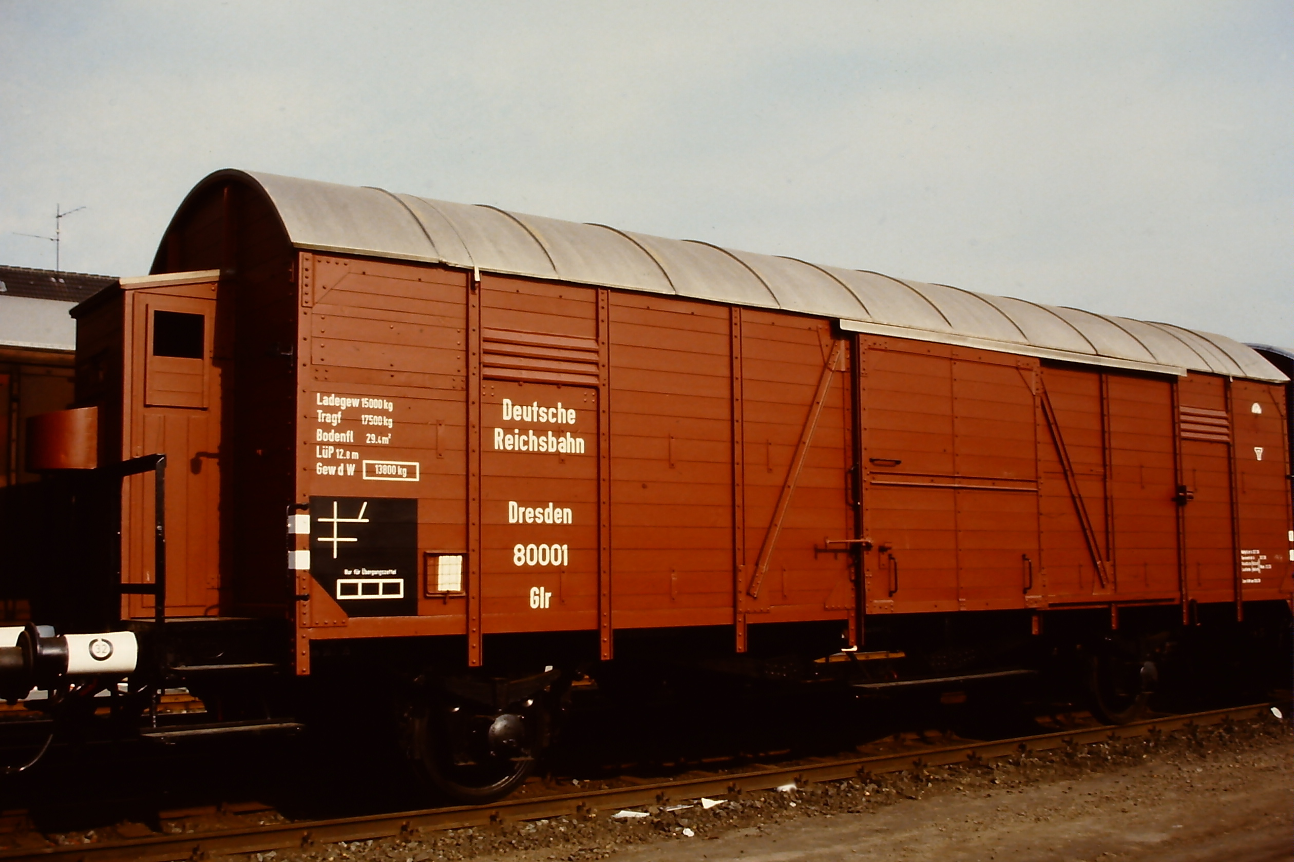 Gedeckter Güterwaggon Glr Dresden 80001, ausgestellt auf der Fahrzeugschau 150 Jahre deutsche Eisenbahn in Bochum-Dahlhausen